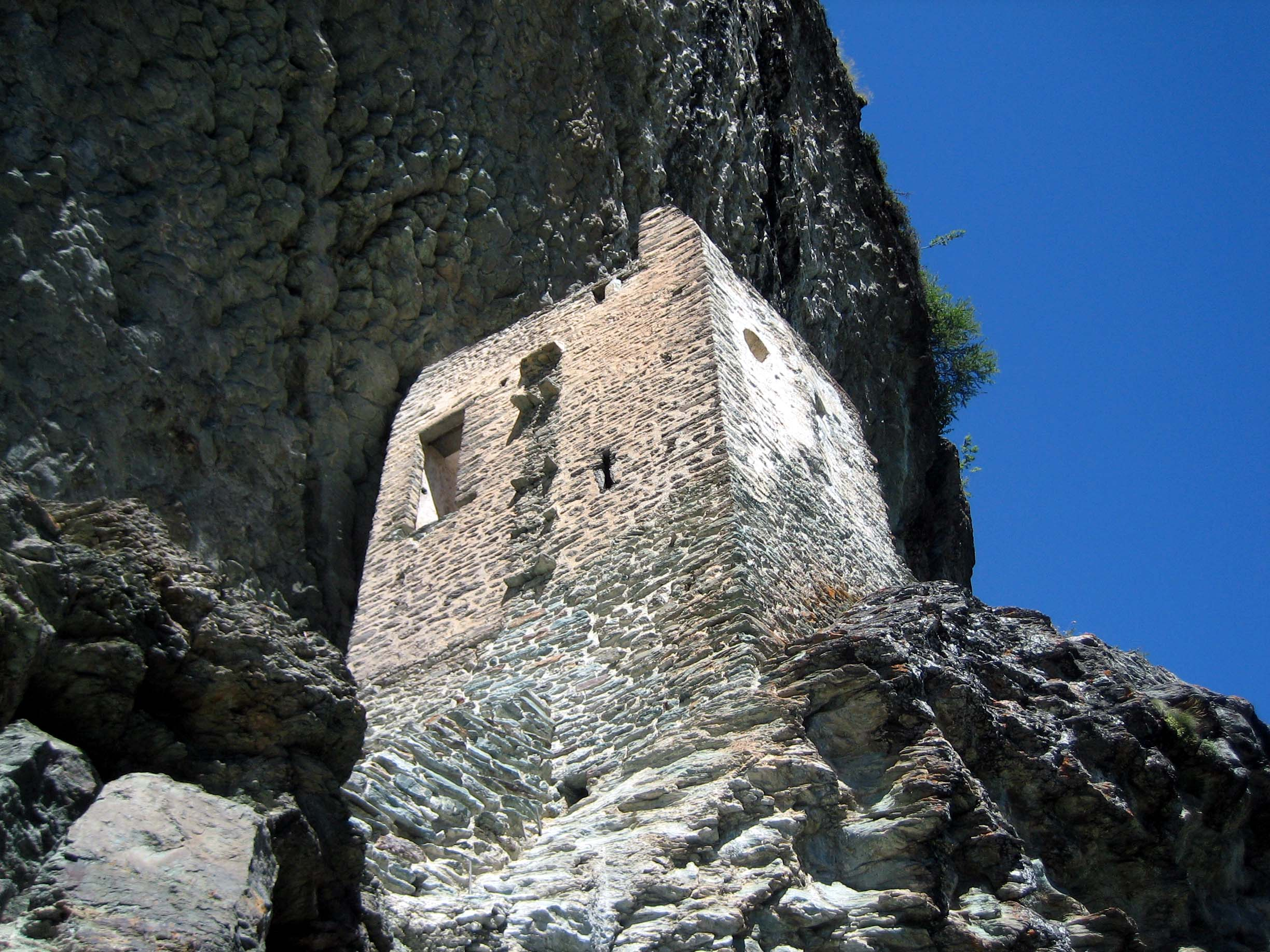 Kapelle